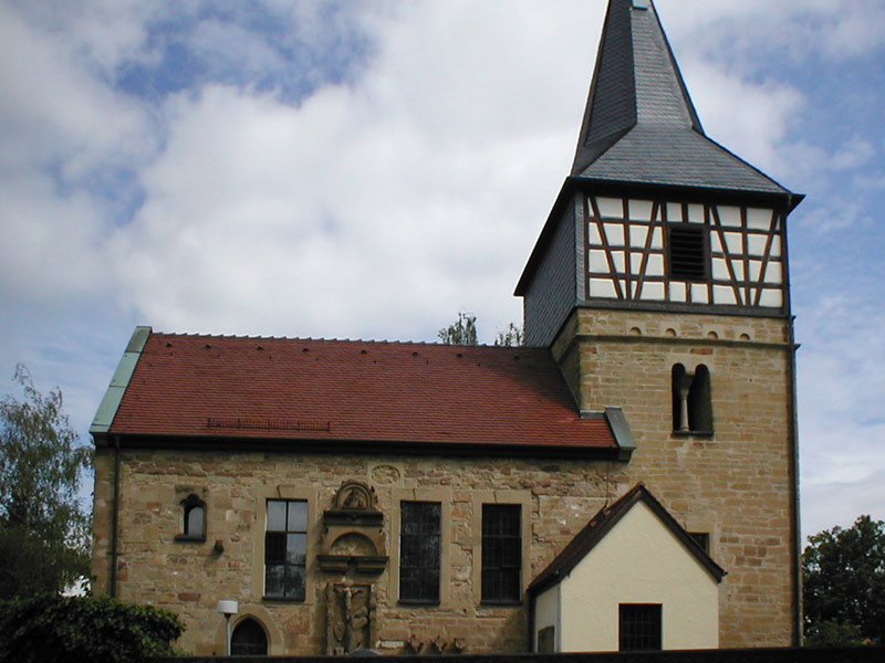 Kirche St. Martin in Güglingen-Frauenzimmern, Ansicht von Süden